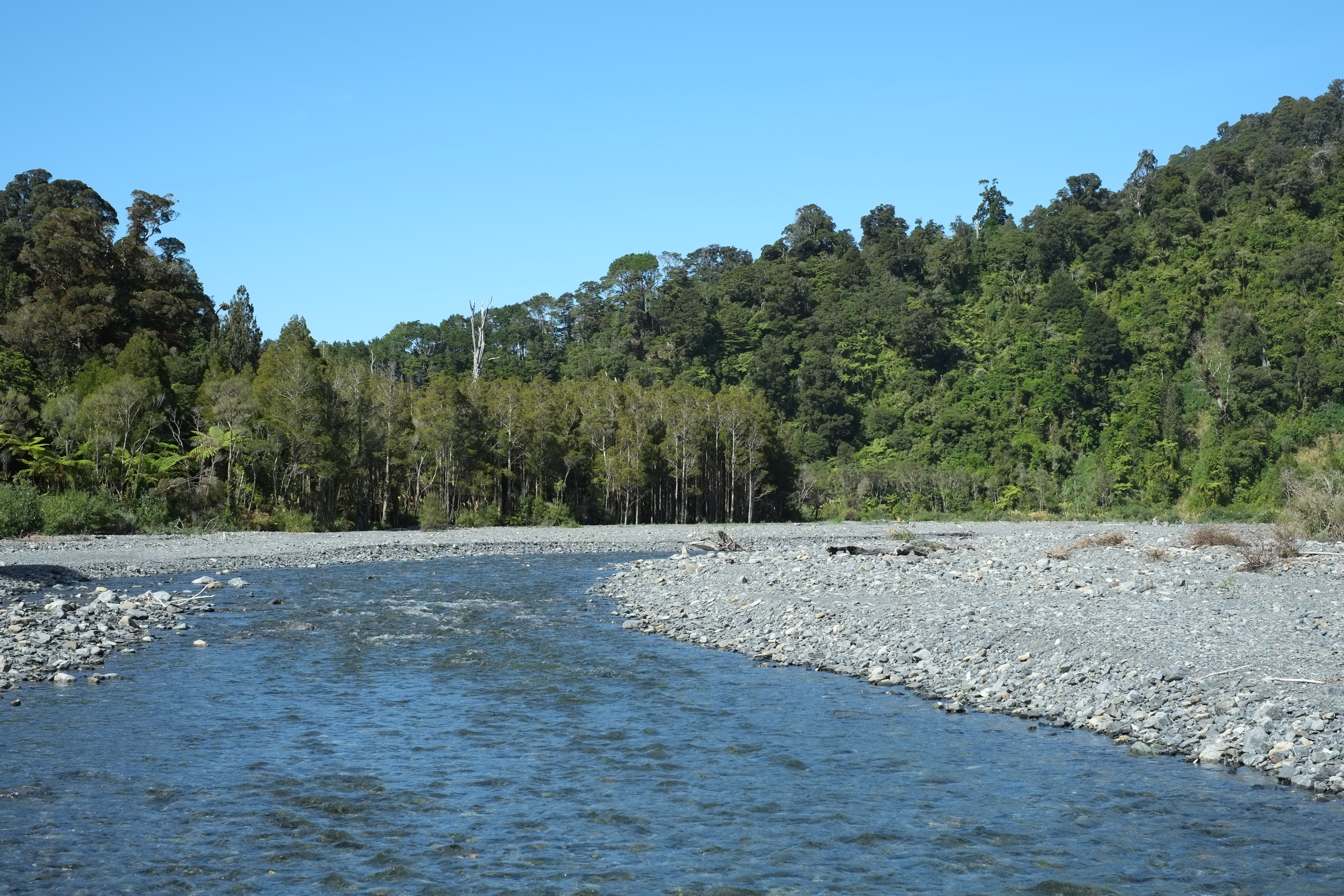 Orongorongo River